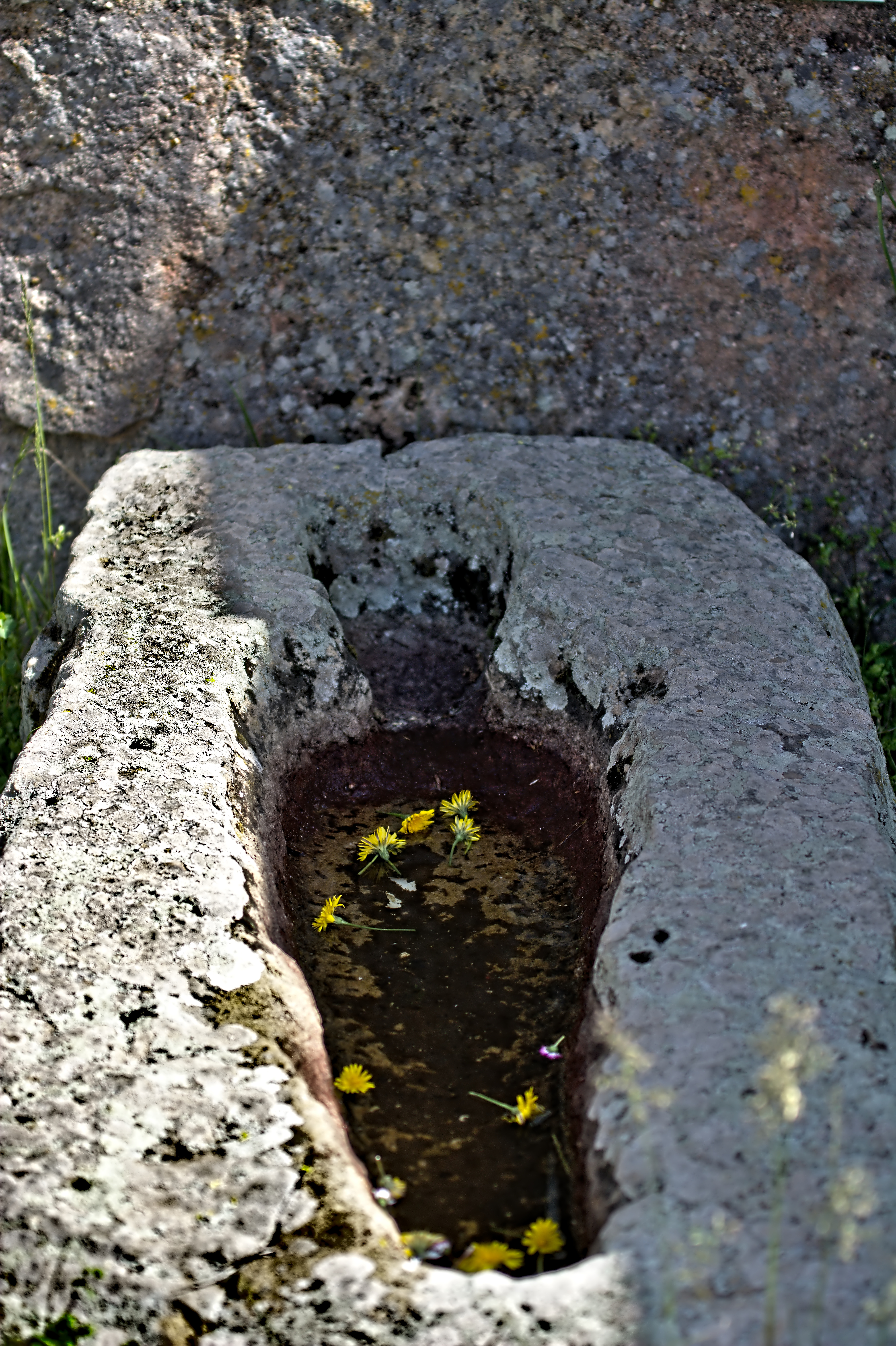 Monasterio de la Sierra